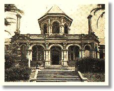 Description: "Cumbooquepa" at Somerville House, circa 1920.